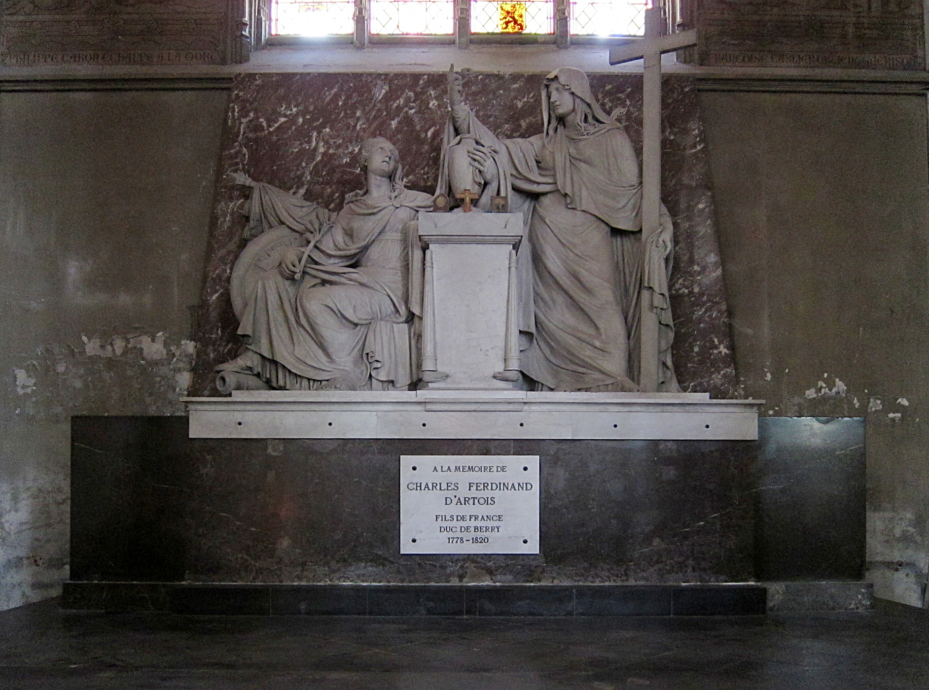 Monument à Charles Ferdinand d'Artois dans l'église Saint-Maurice de Lille (Nord).